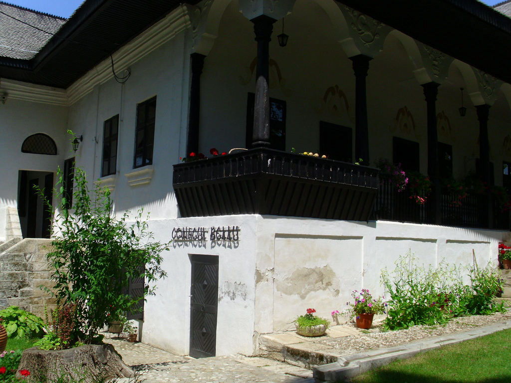 DSCI1634